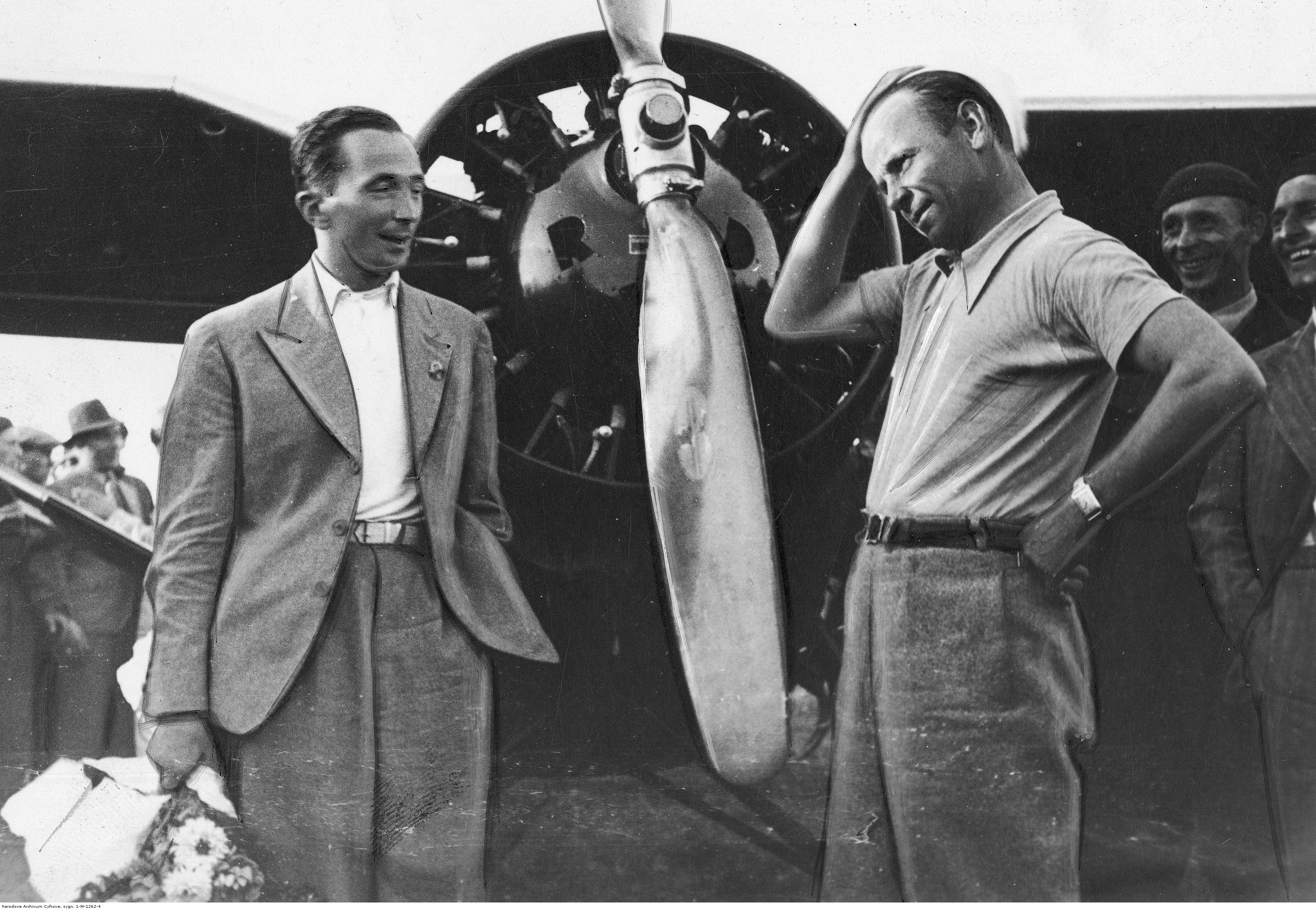 Międzynarodowe Zawody Samolotów Turystycznych (Challenge 1934) w Warszawie. Kapitan pilot Jerzy Bajan (z lewej) i jego mechanik sierżant Gustaw Pokrzywka przed samolotem RWD-9S. Koncern Ilustrowany Kurier Codzienny - Archiwum Ilustracji. Sygnatura: 1-M-1262-4